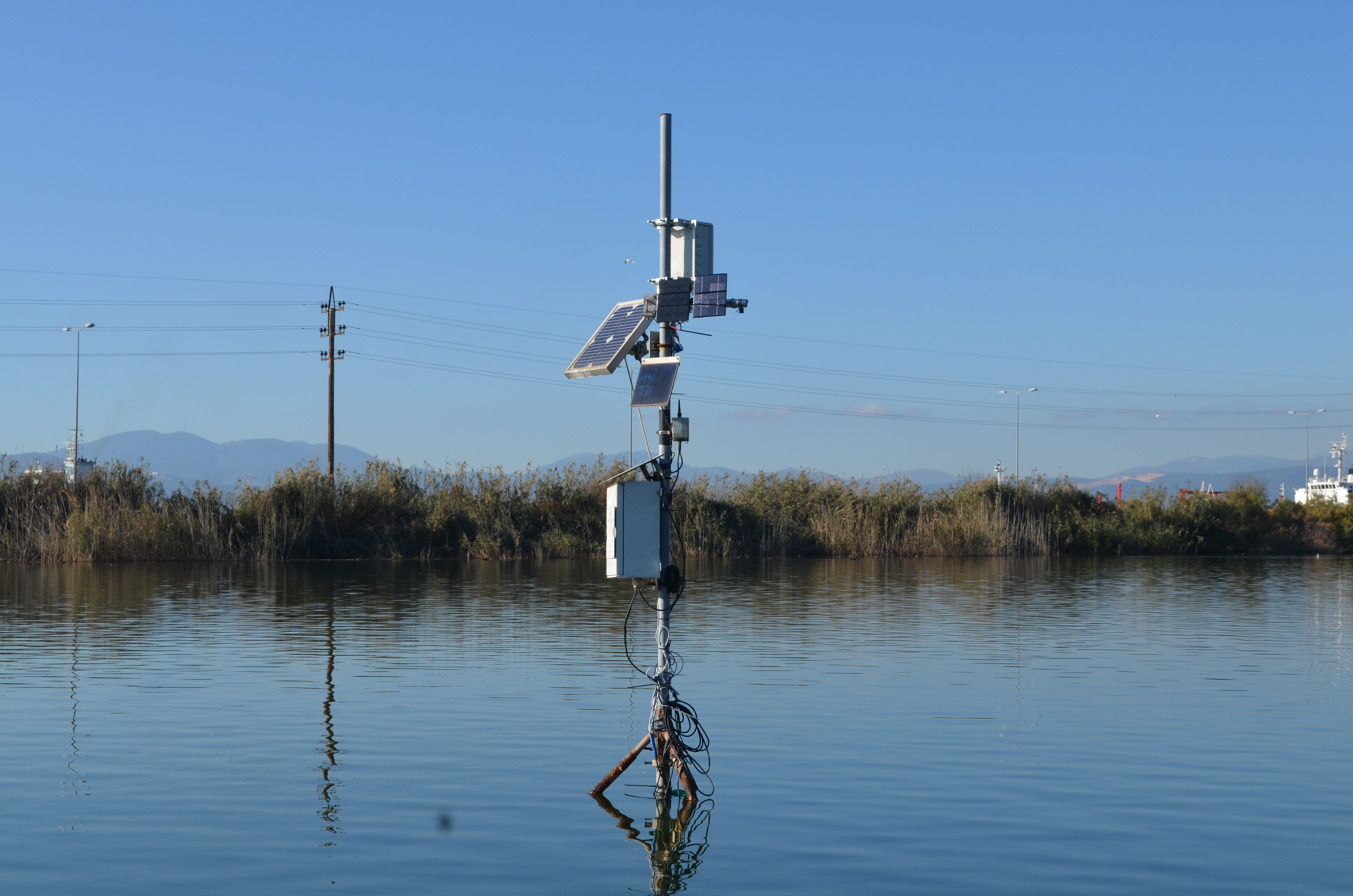 Αυτόματος τηλεμετρικός σταθμός μέτρησης ποιότητας και ποσότητας υδάτων, εγκατεστημένος στη λίμνη Κουμουνδούρου, Δυτική Αττική.